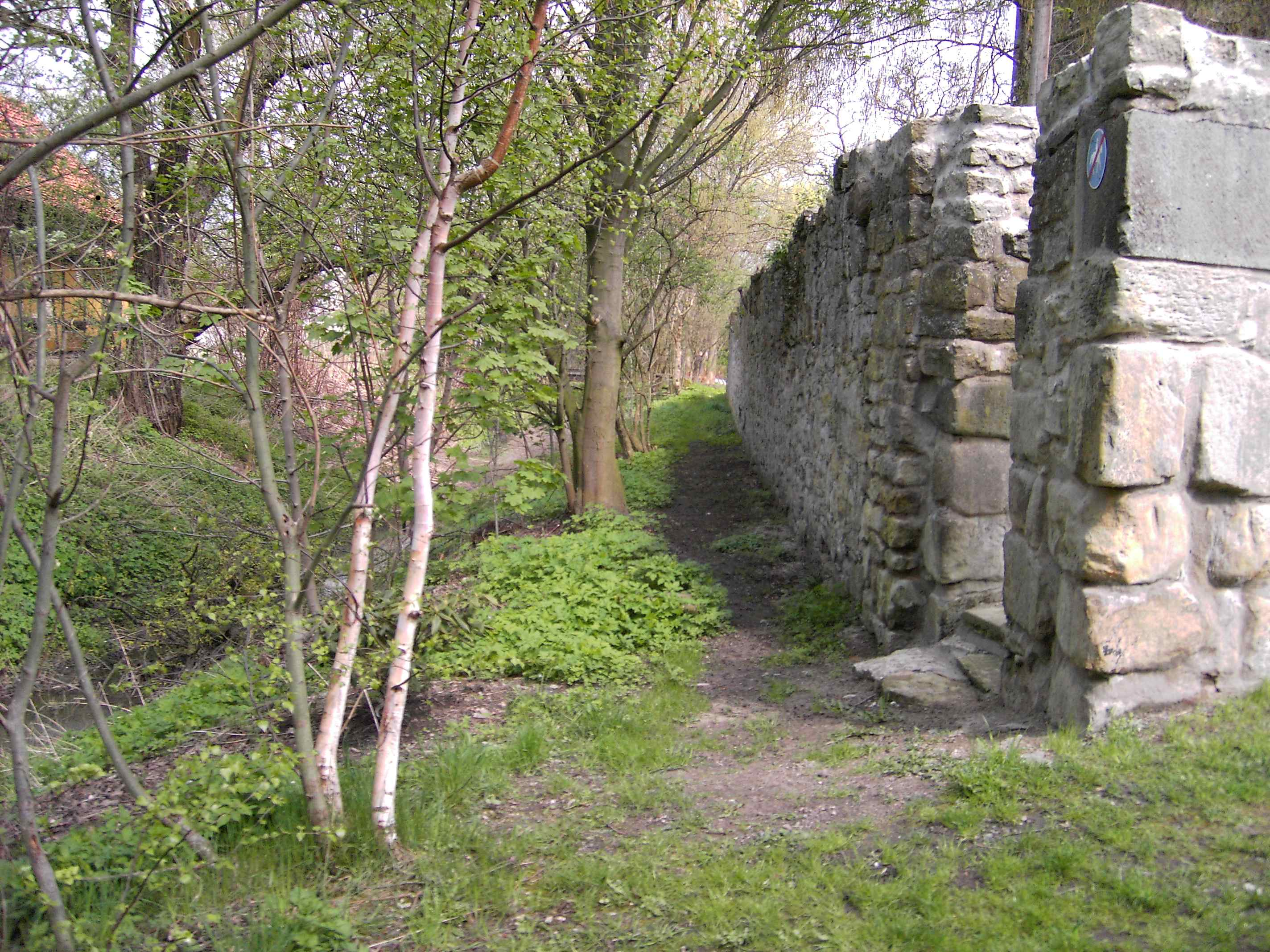 Hildesheim, Burg Steuerwald, Mauer und Graben.